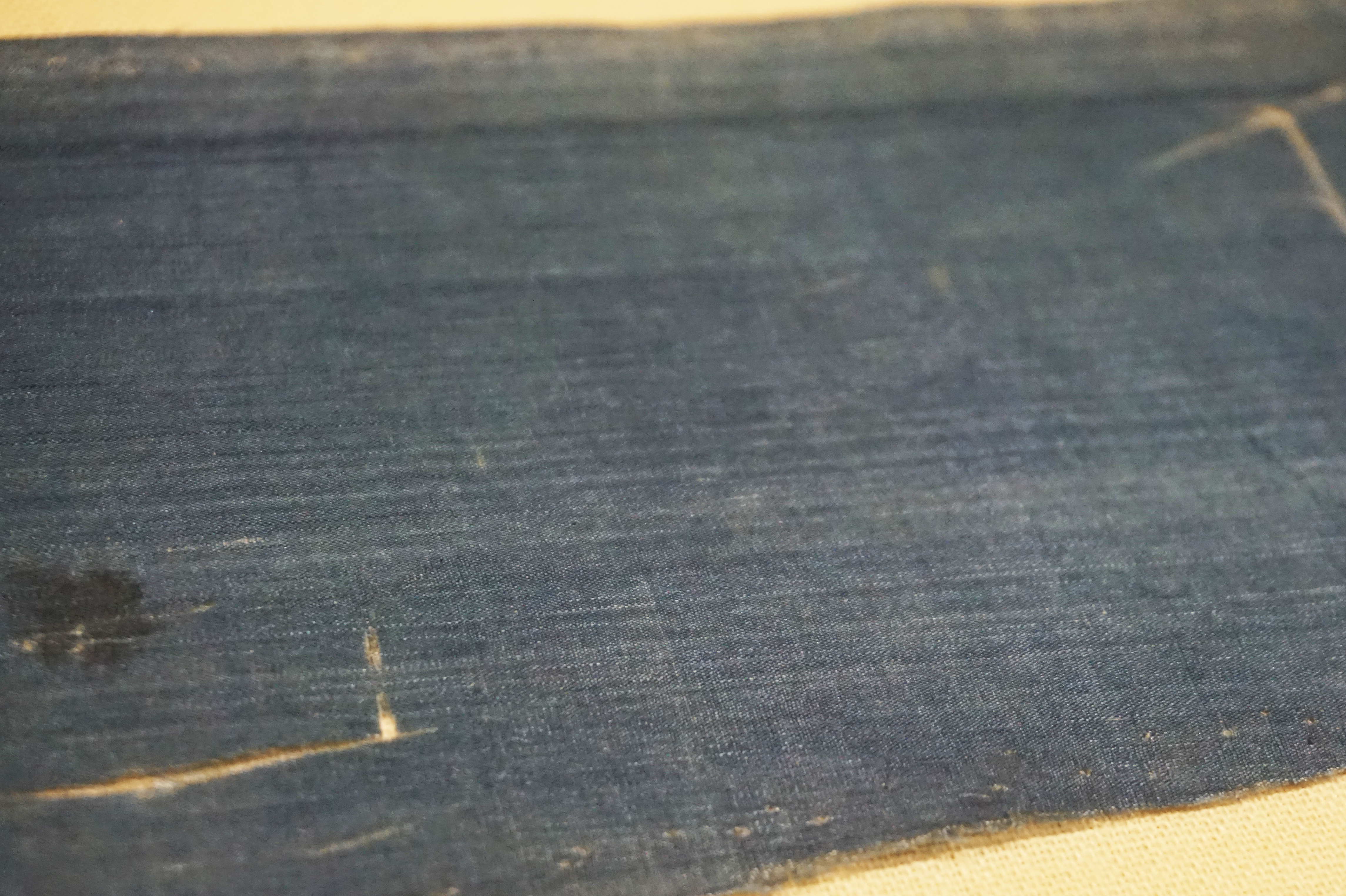 隋代蓝绢片。新疆阿斯塔那墓地出土，新疆维吾尔自治区博物馆捐赠，中国丝绸博物馆藏。